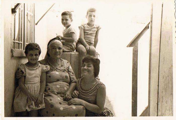 פורטרט משפחתי במעברה בעפולה , לעתיד השיכון הממשלתי. כיום גרה המשפחה בקנדה ולוקחת חלק במרכז ויזנטל העולמי לרדיפת הנאצים שעדיין חיים.